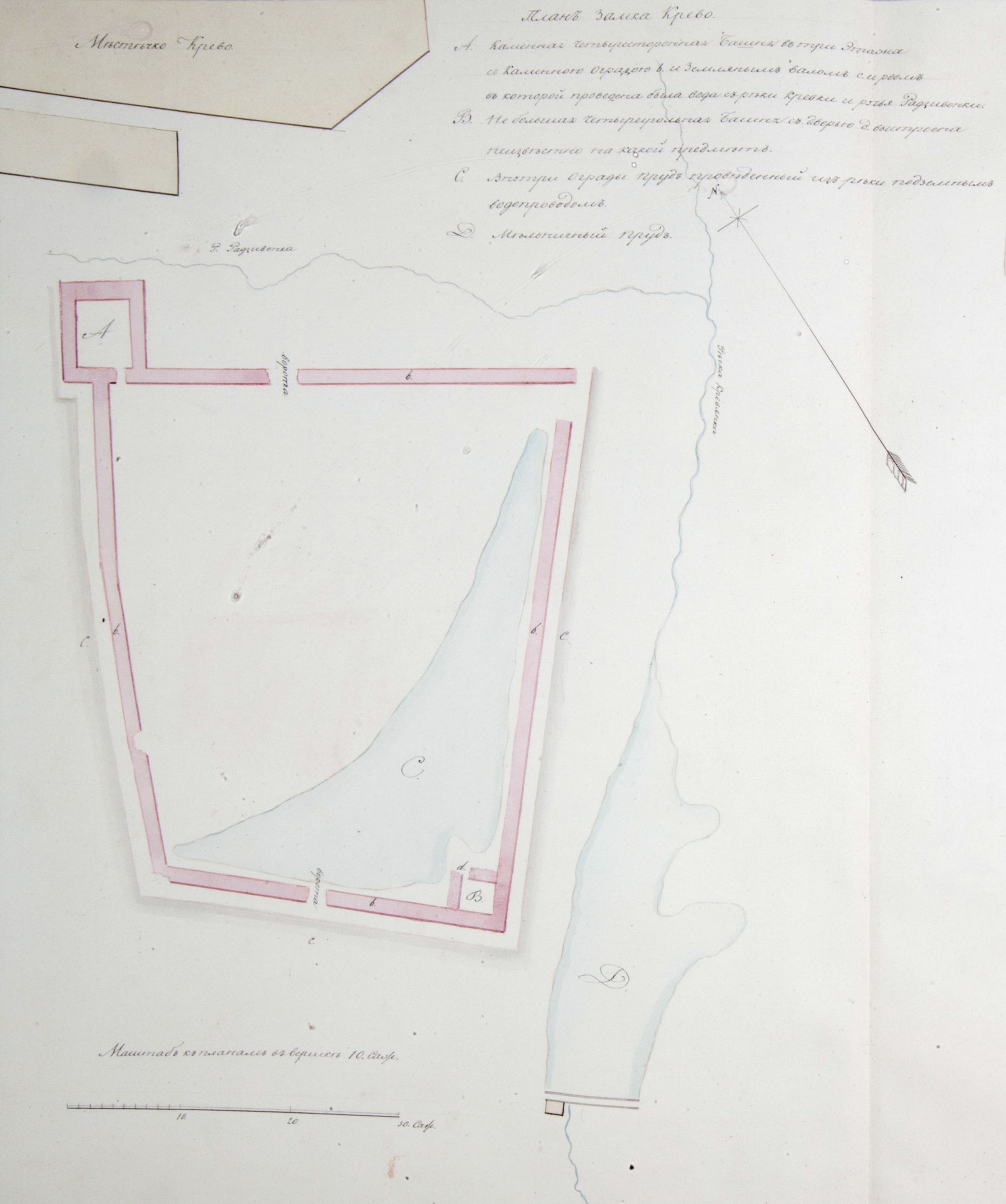 Беларуская (тарашкевіца): Крэва (Kreva). Замак